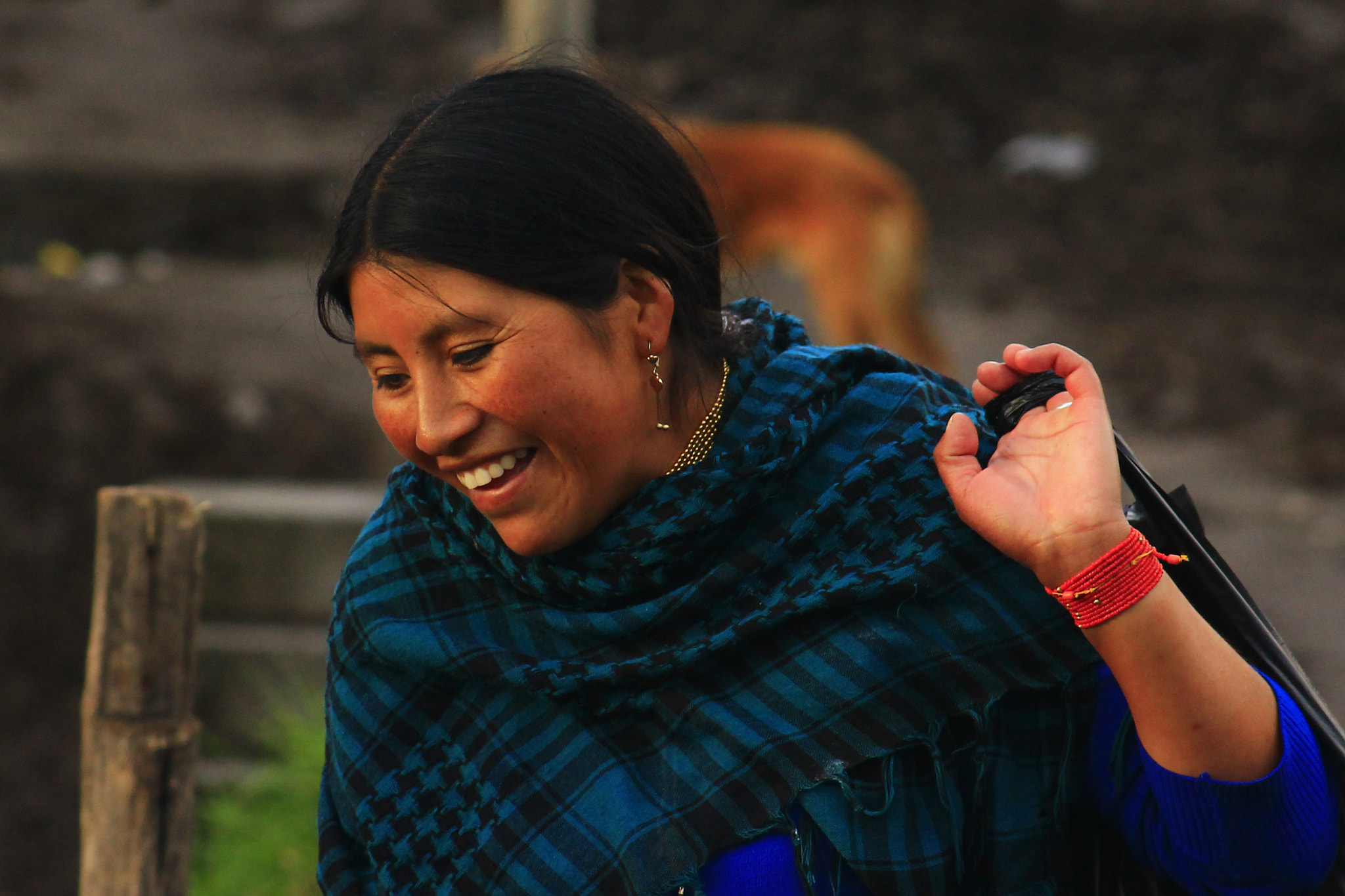 500px provided description: Otavalo [#Ecuador ,#Ind?gena ,#Otavalo ,#MrDpi]